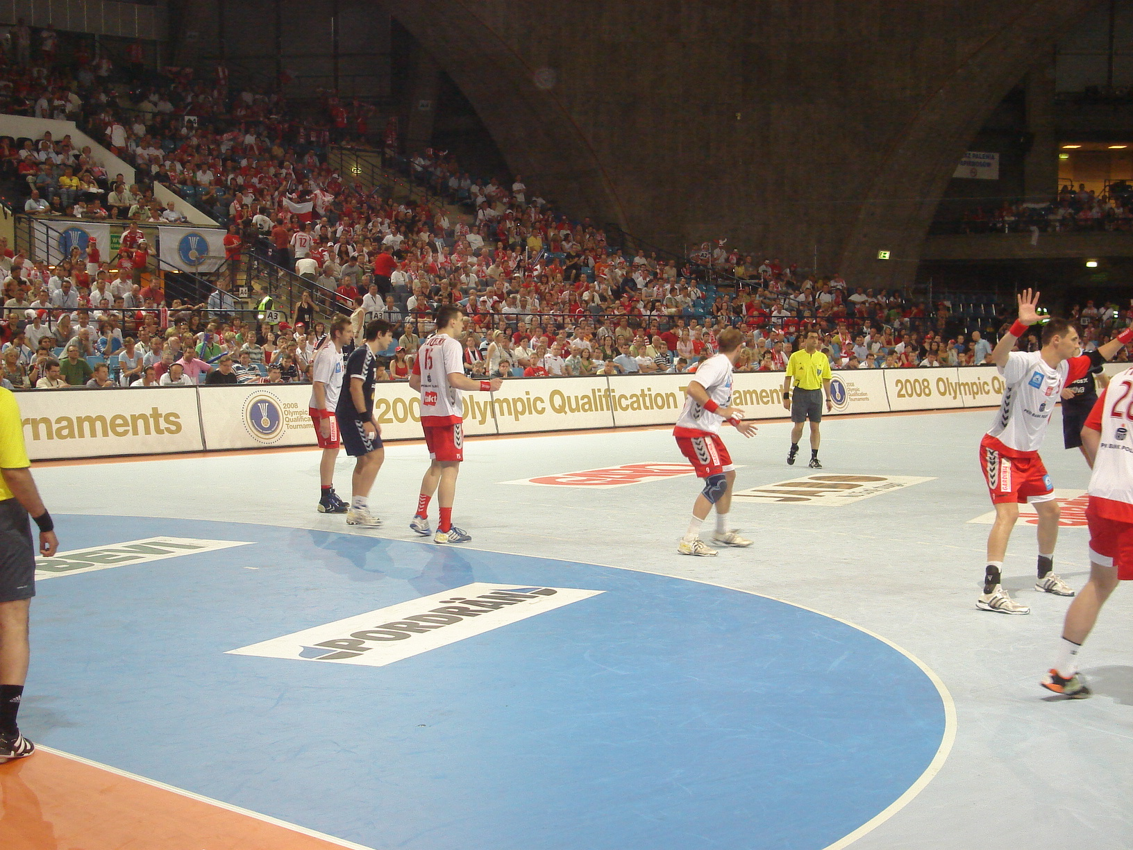 Reprezentacja Polski w piłce ręcznej mężczyzn podczas meczu z reprezentacją Argentyny w trakcie turnieju eliminacyjnego do Igrzysk Olimpijskich w Pekinie - Wrocław 2008